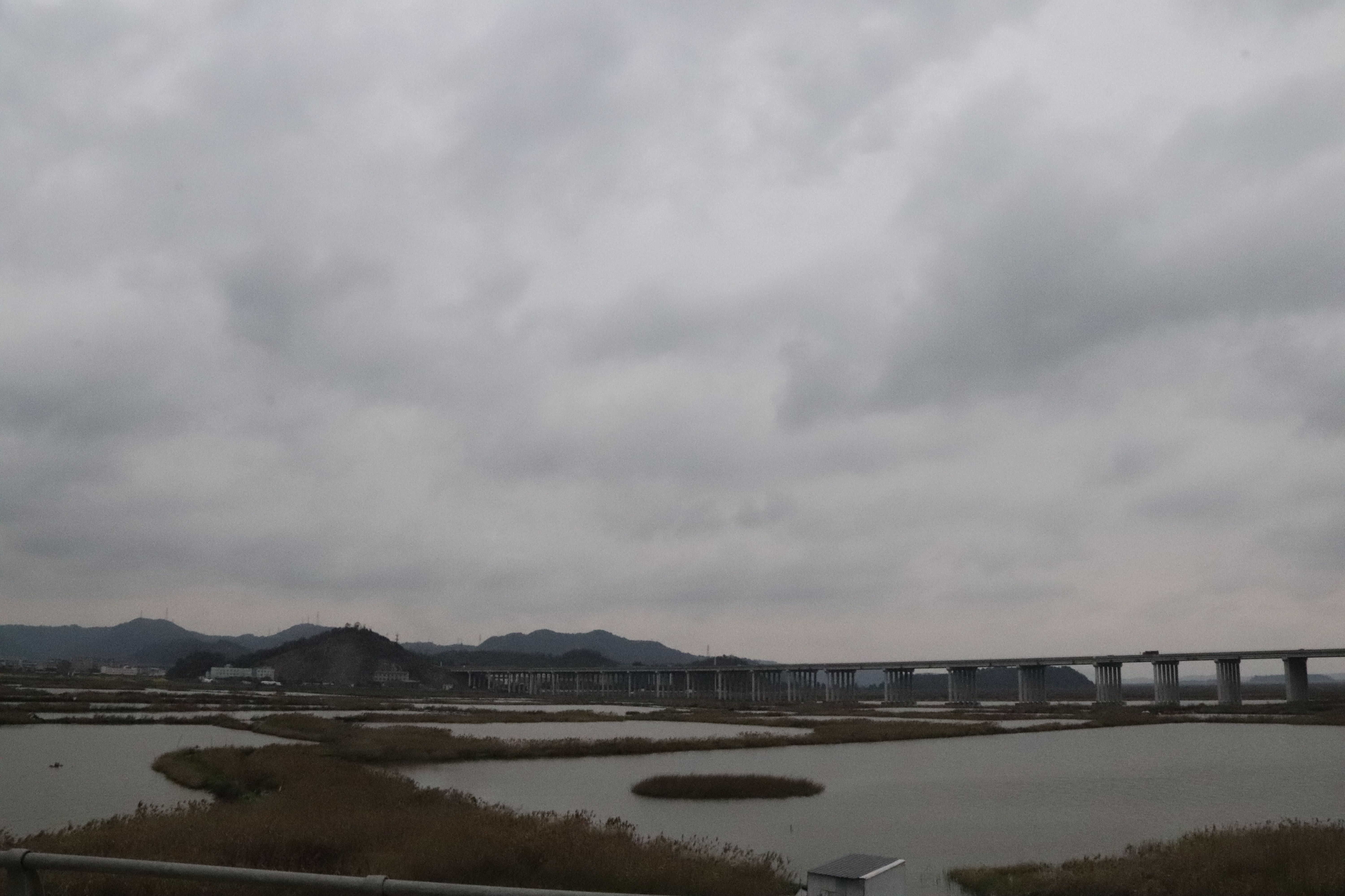 中文（中国大陆）: 沿海高速玉环段